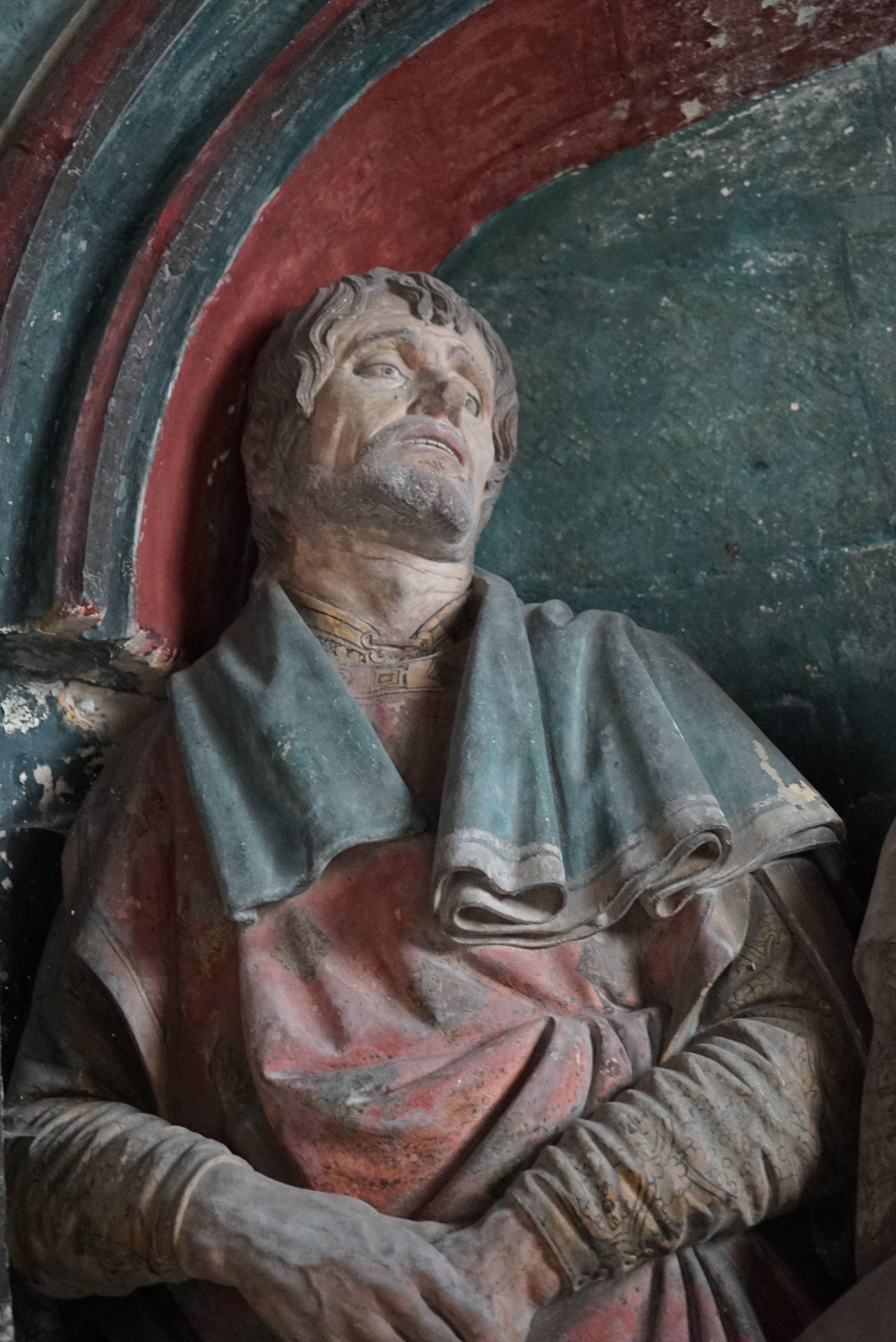 Jean IV d'Amboise ? vue de l'intérieur de la chapelle.